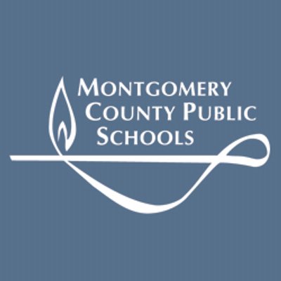 Oficiala logo